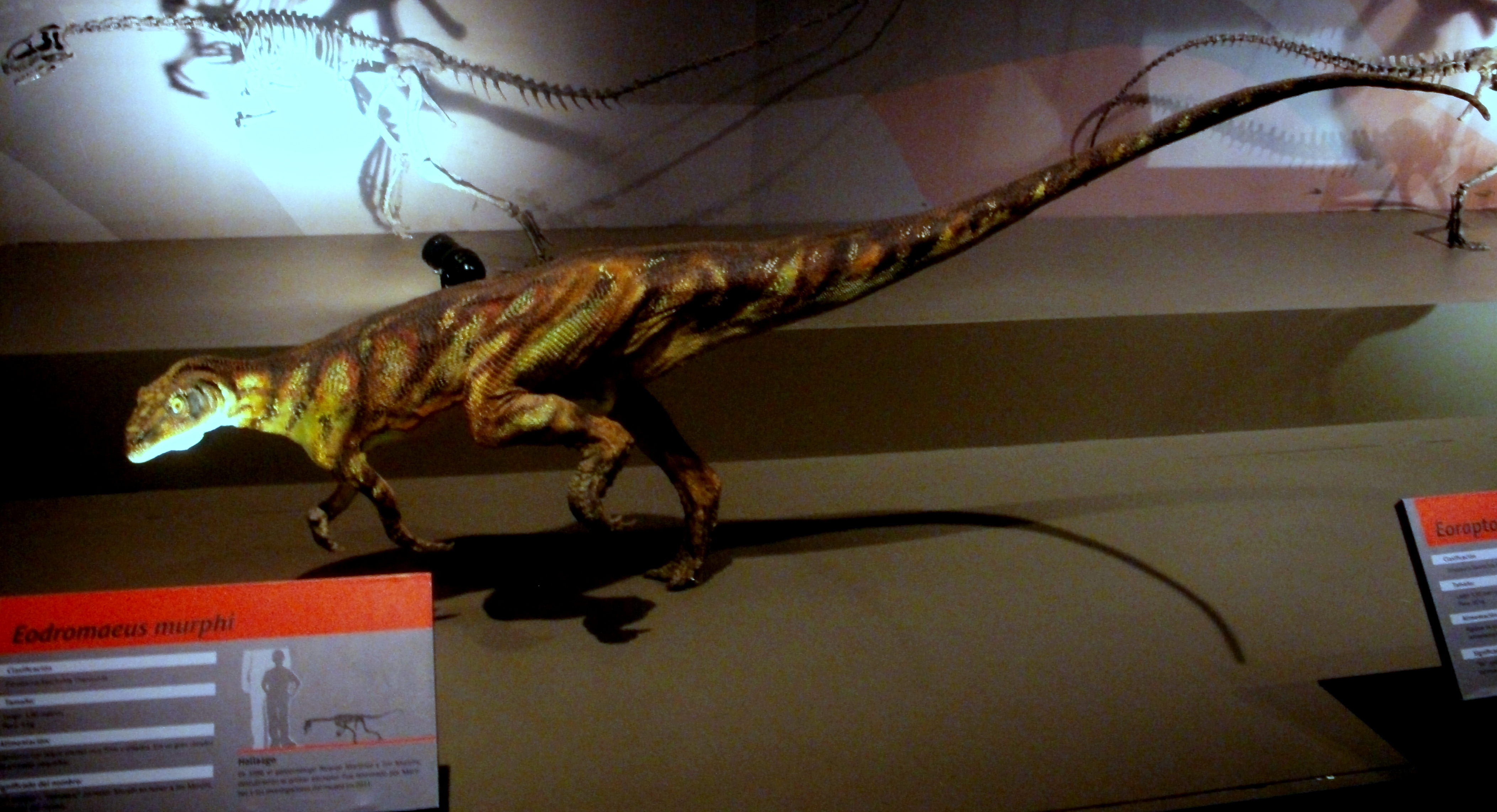 Recreación paleoartística de la locomoción del carmivoro